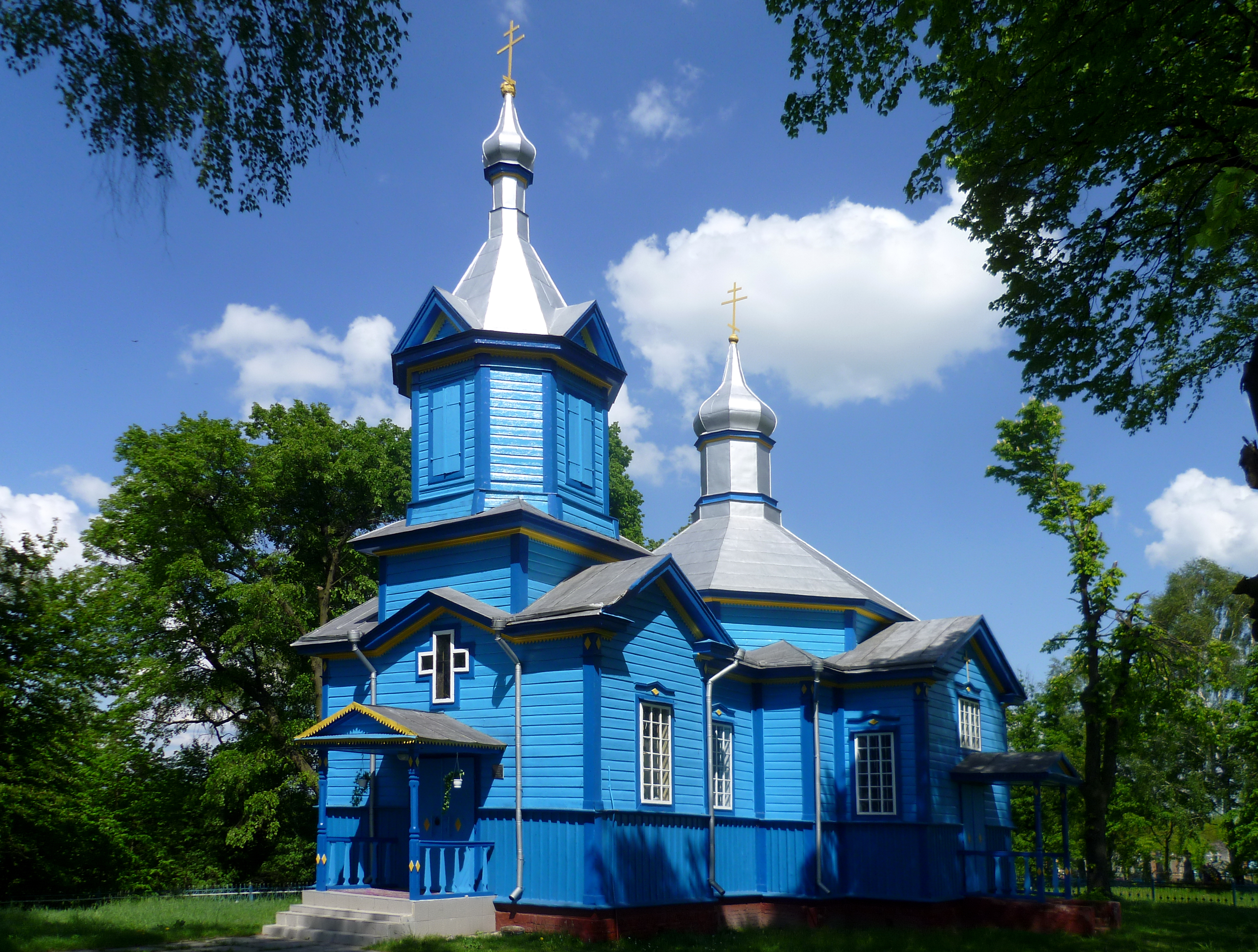 Свято-Троїцька церква (1907 рік) – вигляд з південного заходу – с. Чорників (біля прикордонної смуги) Володимир-Волинський район Волинська область Україна